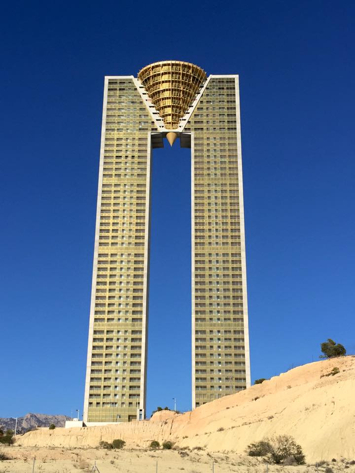 Edificio In Tempo completado